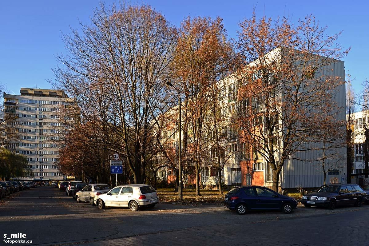 Drukarska 19-25